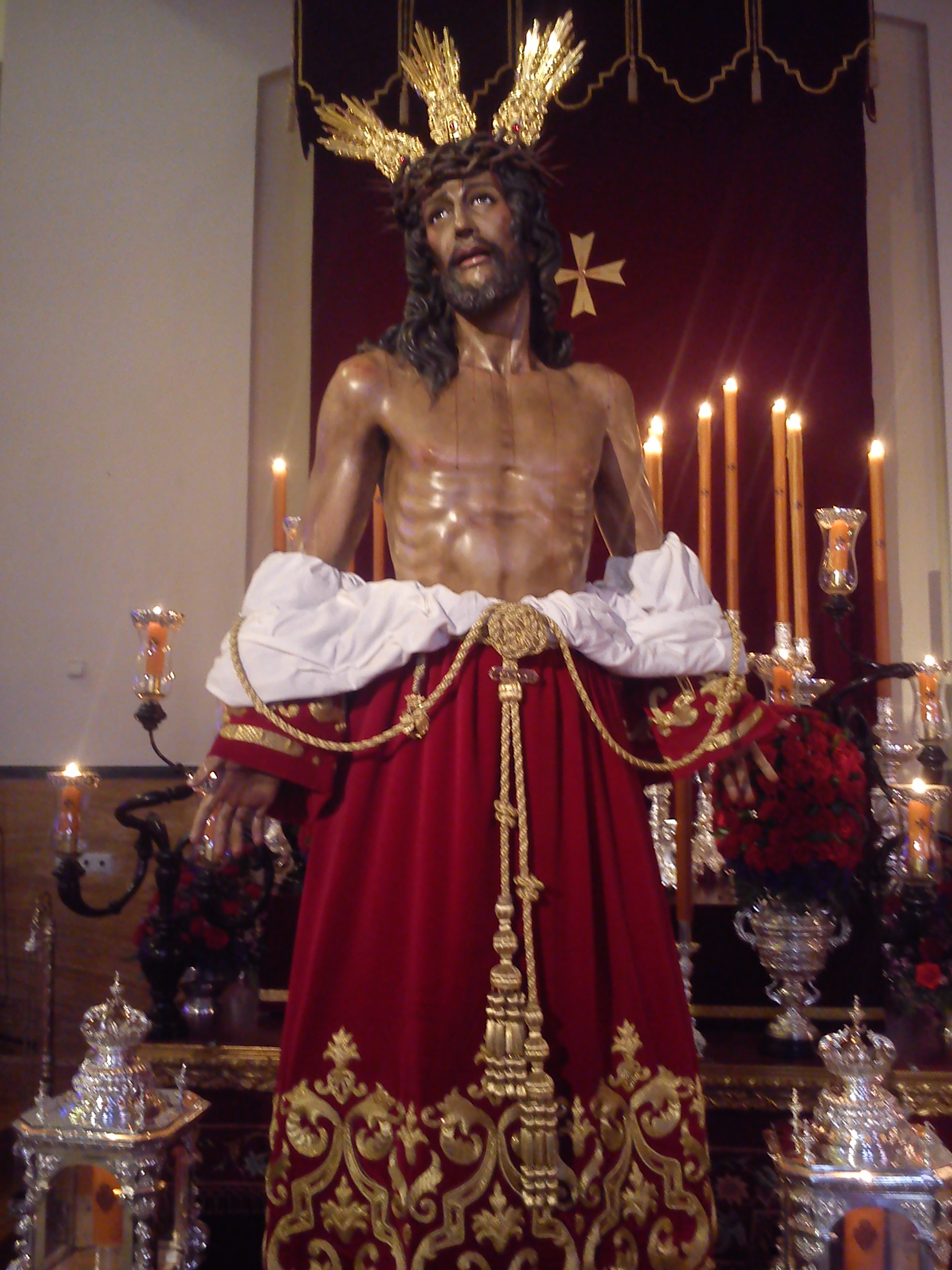 Jesús de la Pasión Despojado de sus vestiduras.